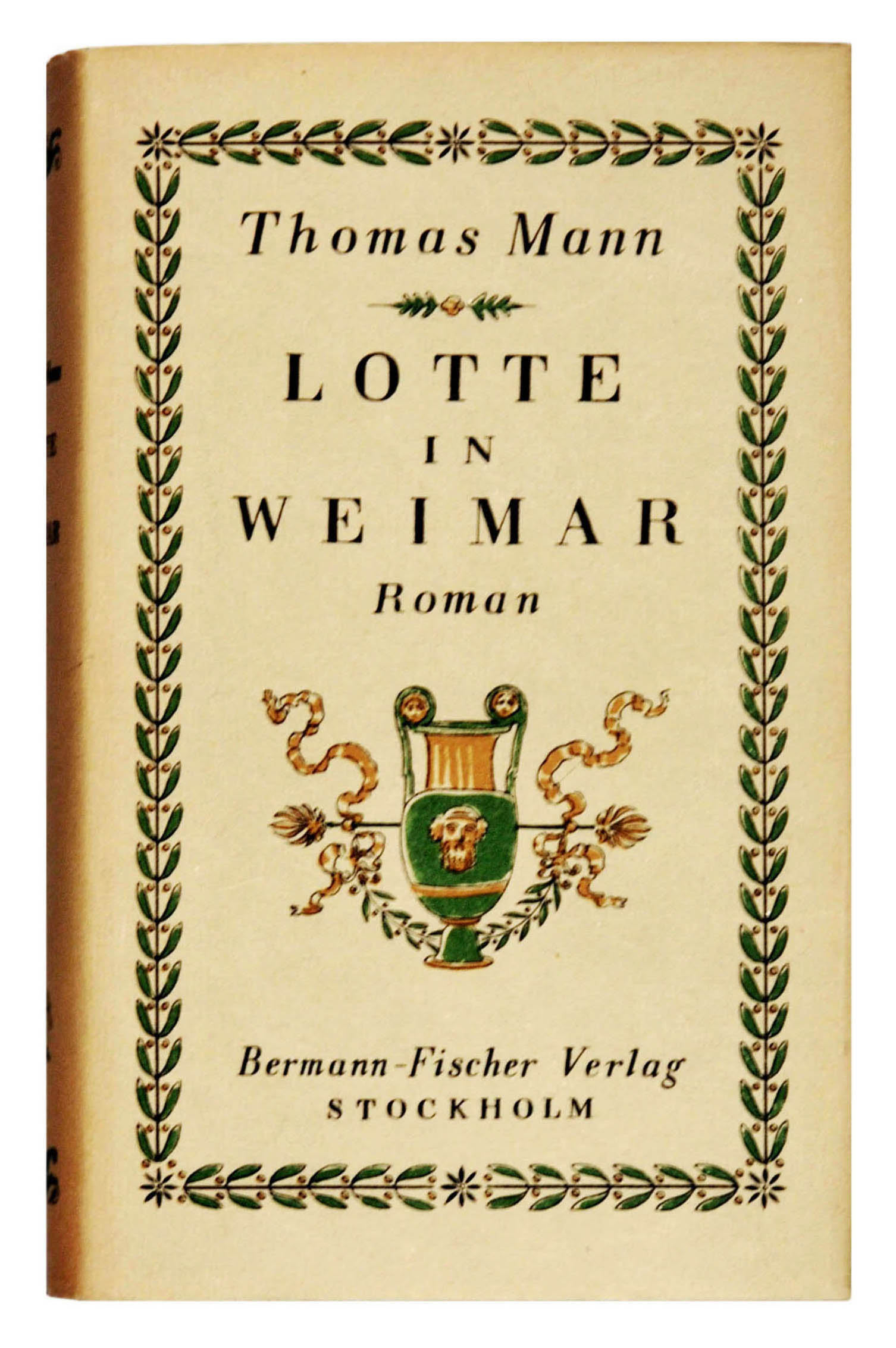 Lotte in Weimar. Roman. Stockholm: Bermann-Fischer 1939, 450 S. Original-Leinen mit Verlags-Umschlag (Yngve Berg), Erstausgabe: Potempa D 7.1, Bürgin I 58, Wilpert-Gühring² 76.